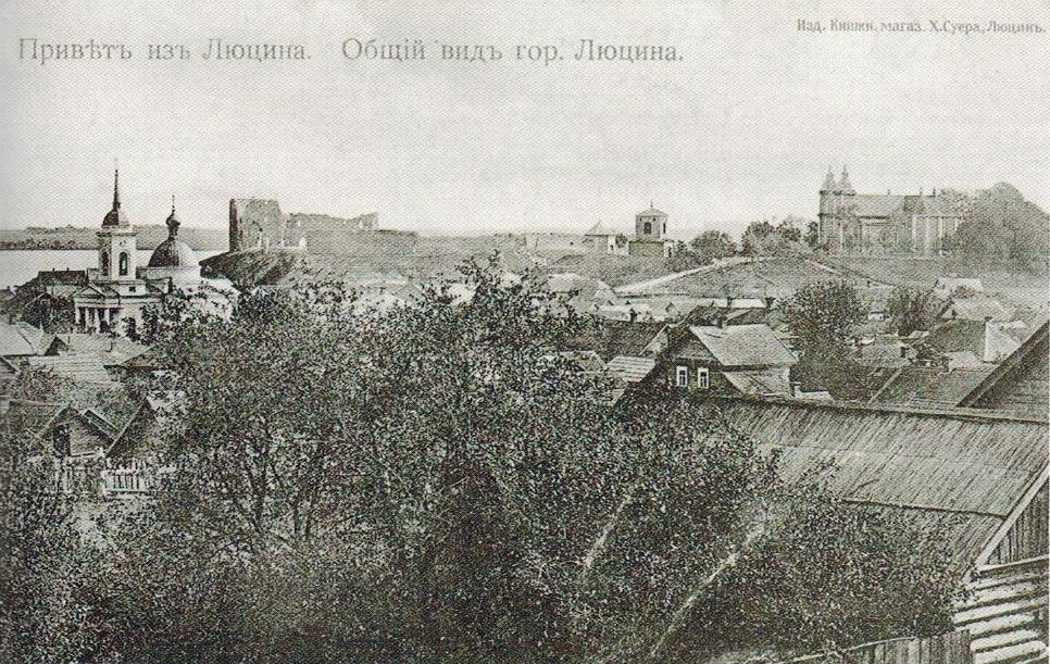 Общий вид города Люцина. Открытка "Изд. Книжн. магаз. Х. Суера, Люцин". 1910-е